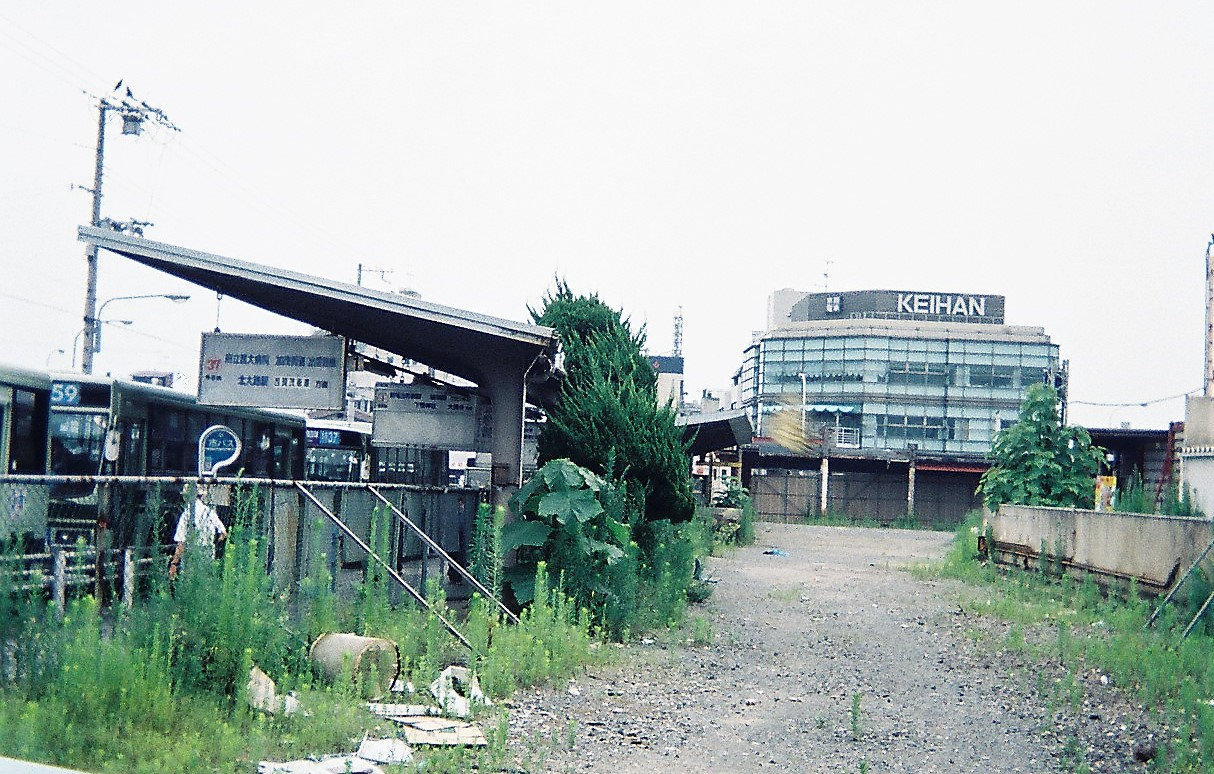 京阪電気鉄道・京津線京阪三条駅跡地（1999年7月撮影）